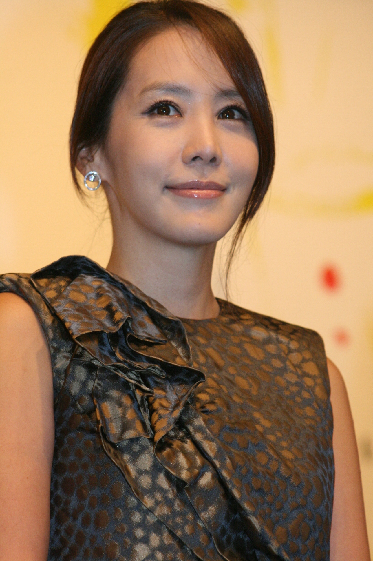 2009년 7월 28일 서울 신라호텔에서 열린 2009 광주김치문화축제 설명회 및 홍보대사 위촉식에 참석한 김정은.